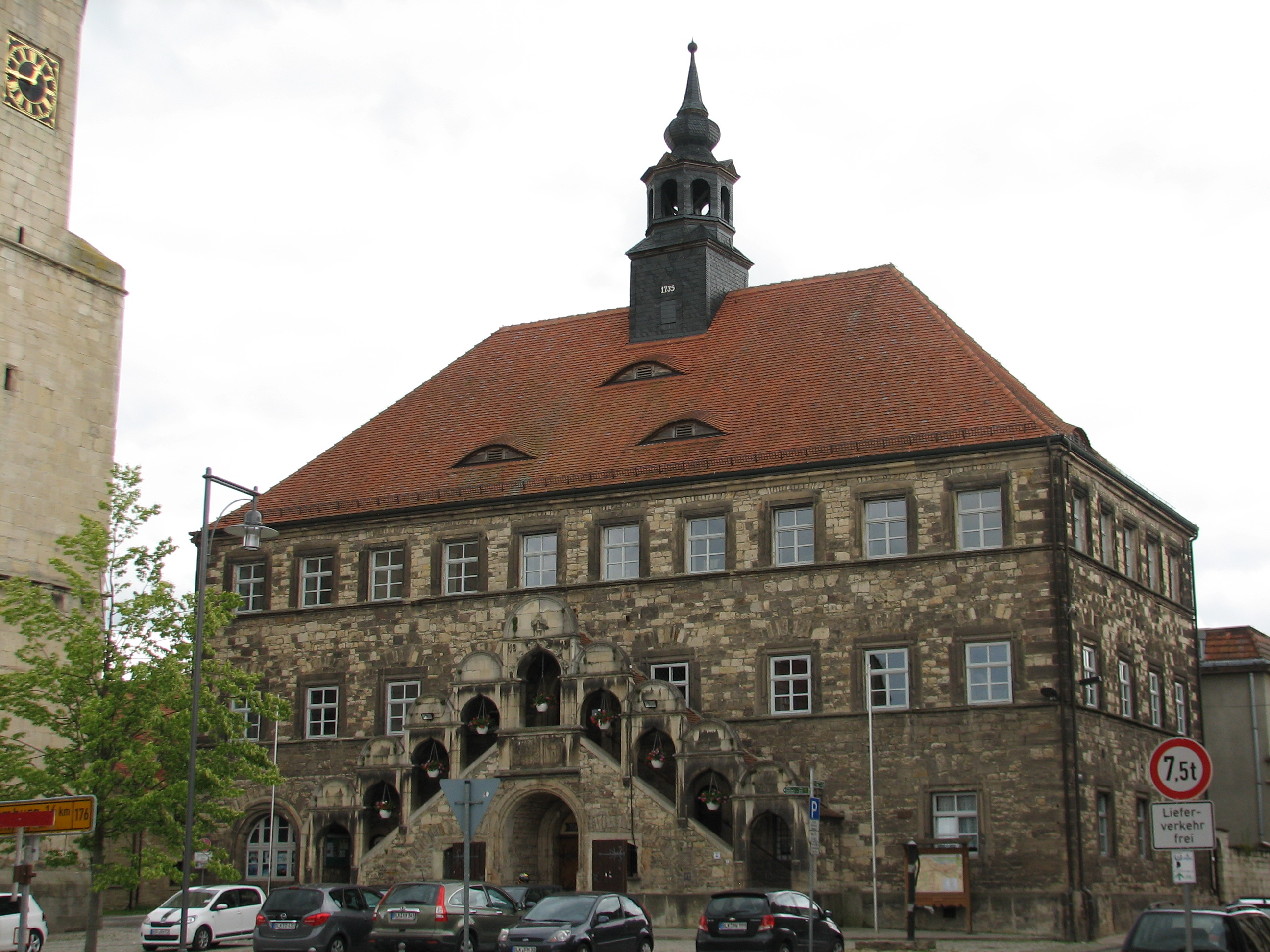 Rathaus Laucha neben der Stadtkirche